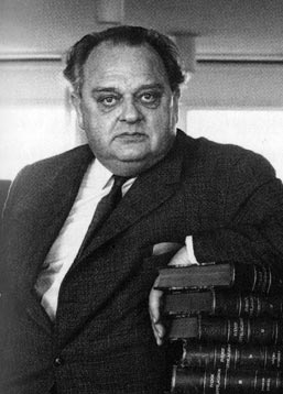 Per Erik Lindorm